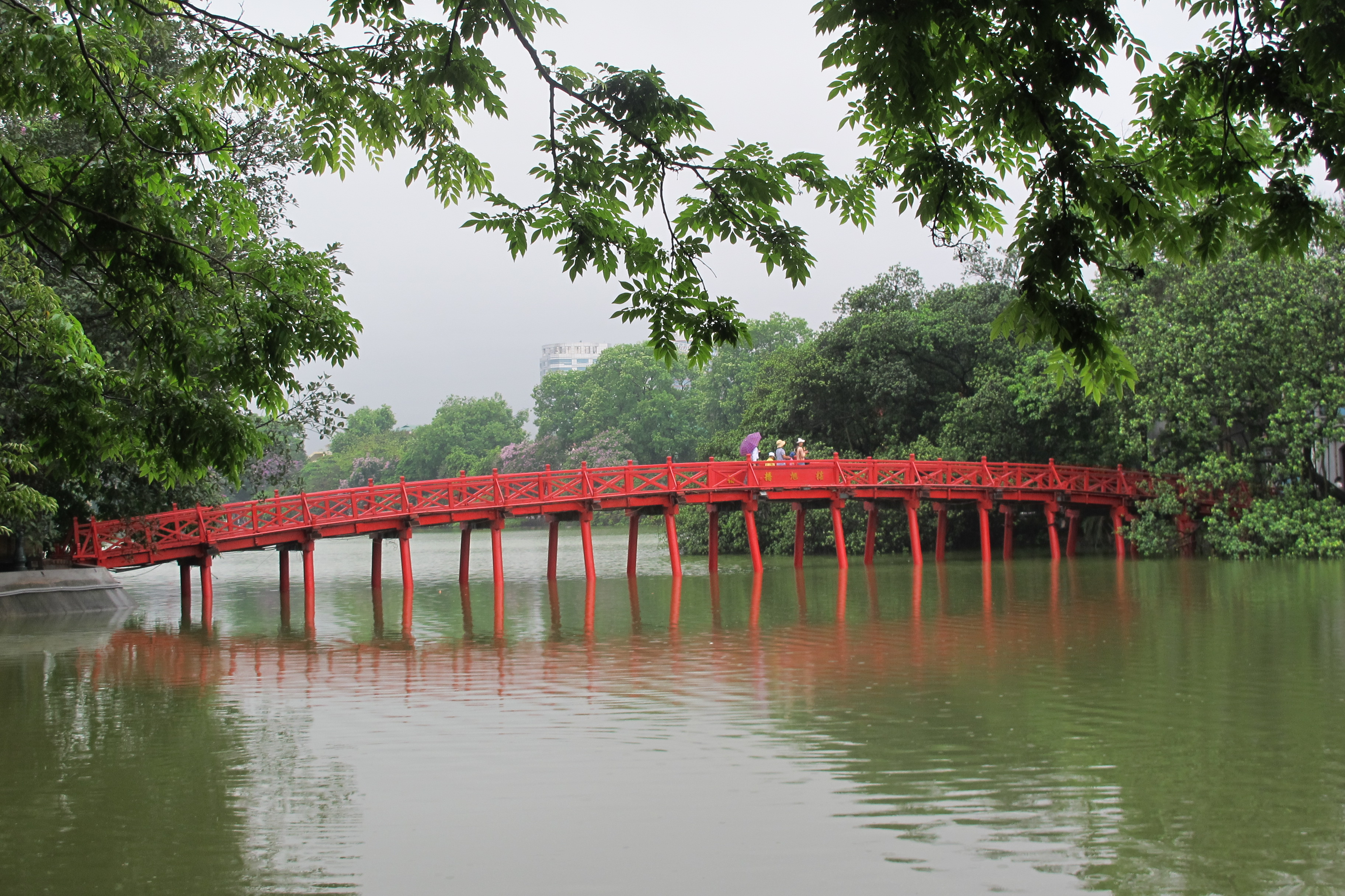 Cầu thê húc Hà nội vietnam